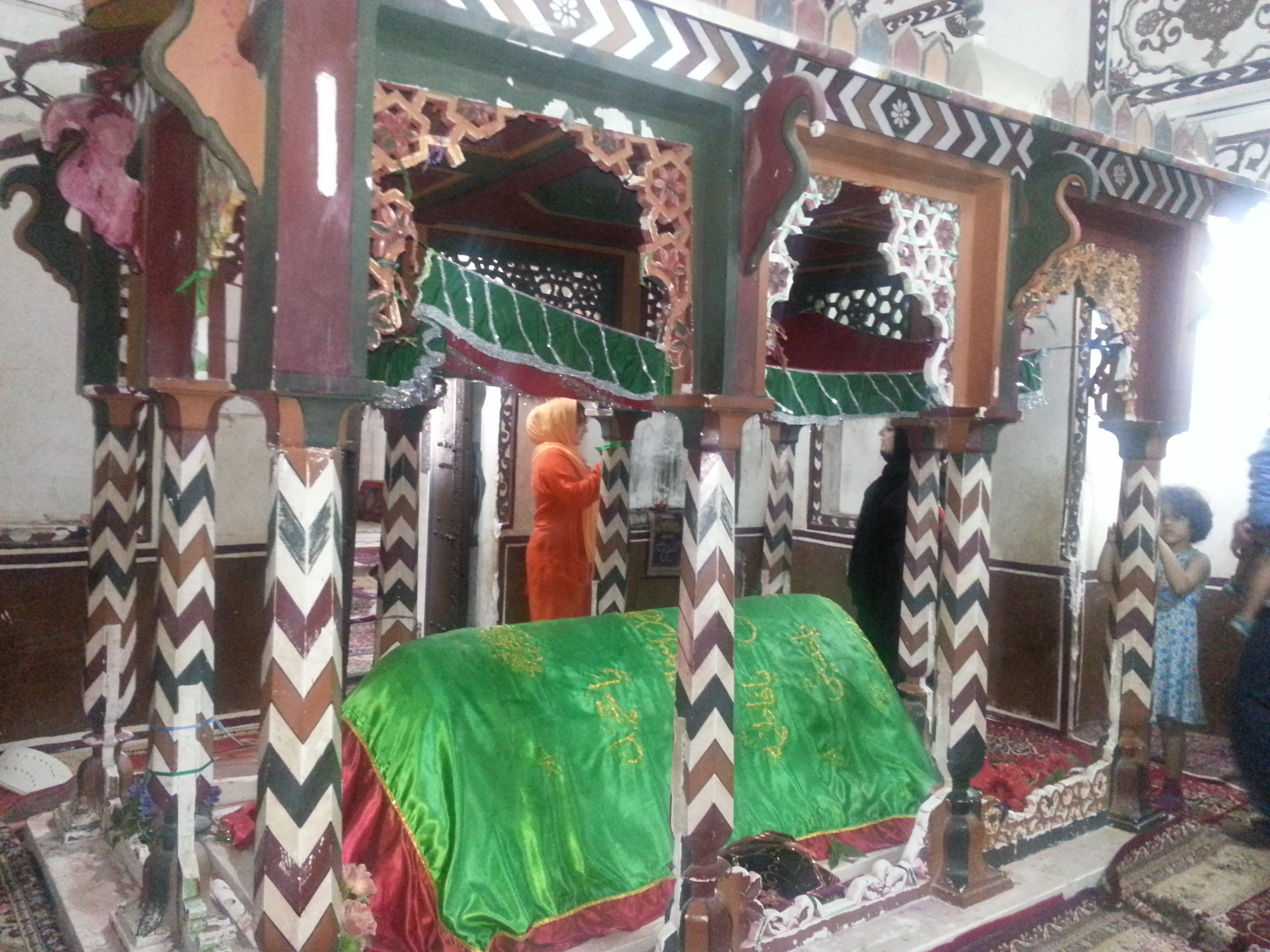 Seyyed Gholam Rasool Mausoleum, Chabahar (بقعه سید غلامرسول، چابهار)